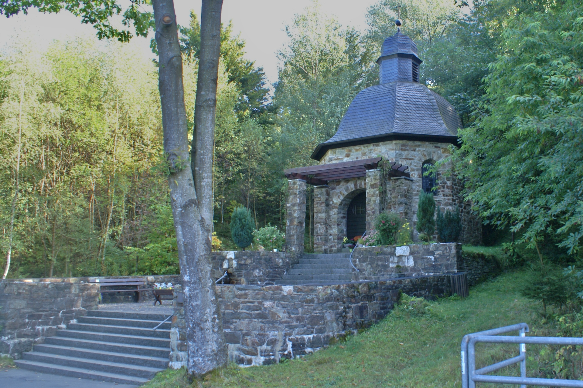 Monschau-Kalterherberg Reichensteiner Strasse NorbertuskapelleThis is a photograph of an architectural monument., no. 380